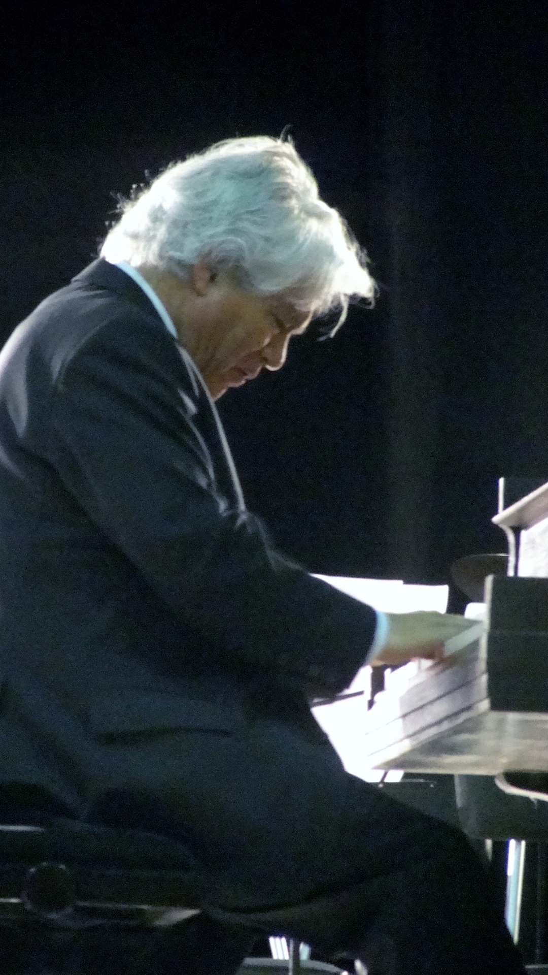 Roberto Bravo dando un concierto en Calama, Chile.